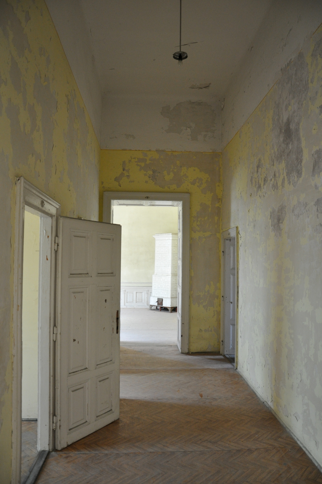 Havas-villa, avagy Dreher villa, Kőbánya, Budapest This is a photo of a monument in Hungary, Identifier: 1079